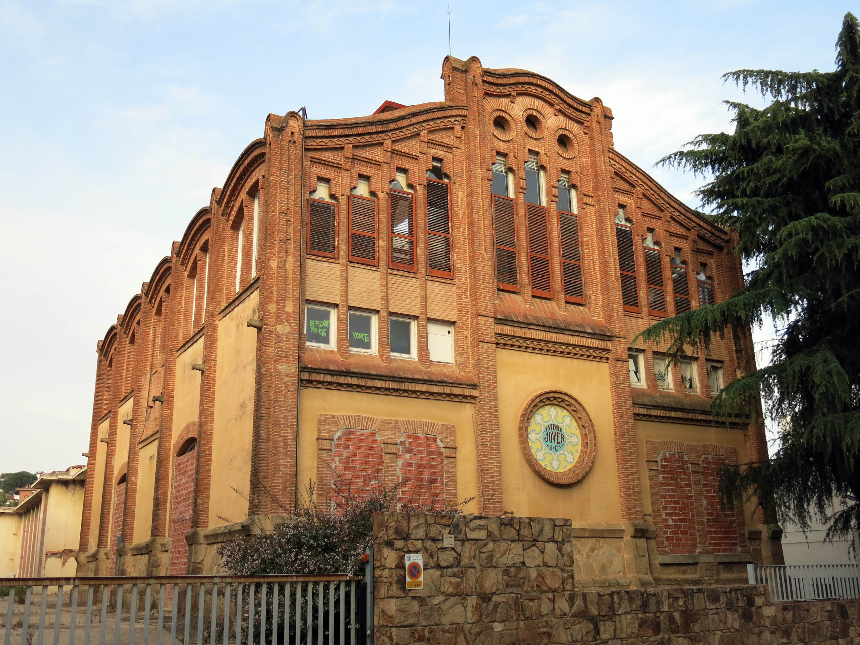 Fàbrica Jover, riera del Pinar 12 (Canet de Mar, Maresme).